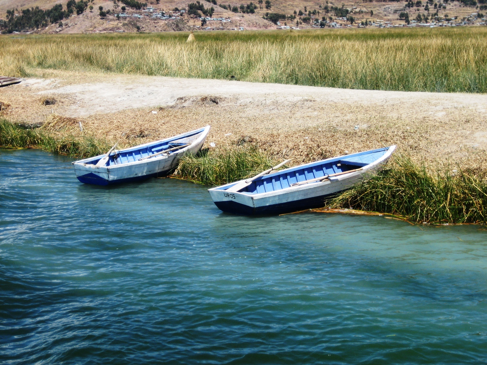 los uros en puno, pueblo milenario